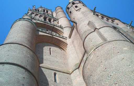 Albi (Tarn, France) - Clocher de la Cathédrale Sainte-Cécile.